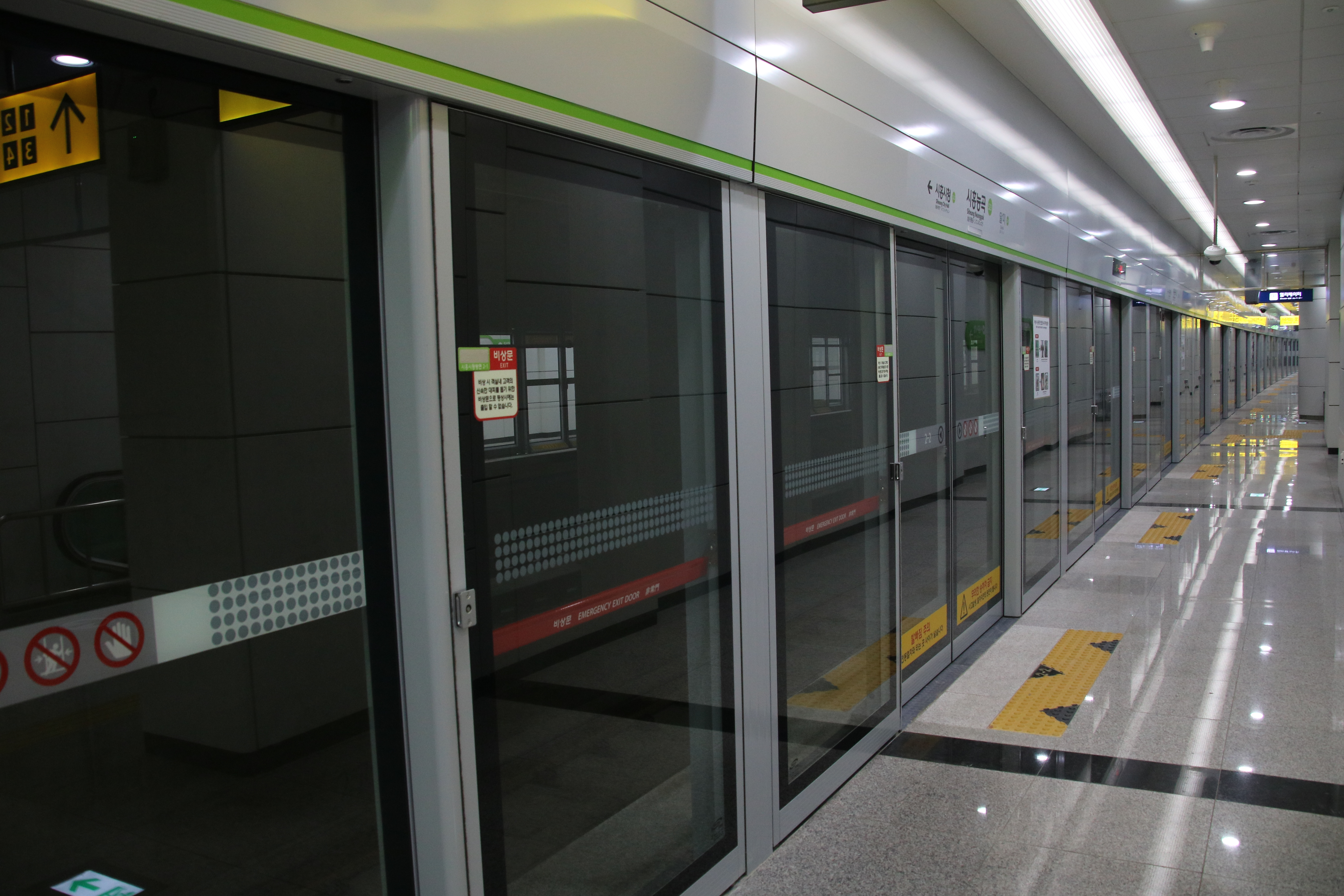 시흥능곡역 승강장